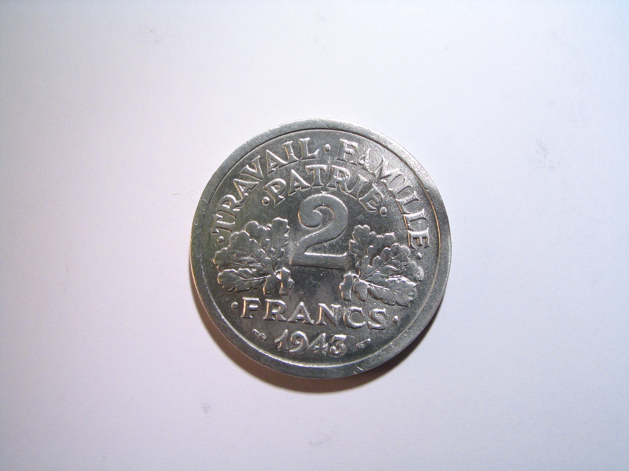 Pièce de monnaie 1943, deux francs, Travail Famille Patrie, État français, régime de Vichy. Valeur du franc 1943 = 0,20326 € 2006